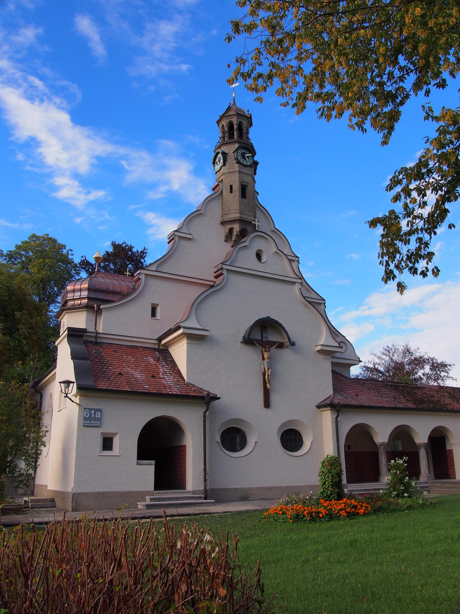 Katholische Kirche Sieben Schmerzen Mariä, ehemals Sankt Andreas; Bezirkskrankenhaus GünzburgThis is a photograph of an architectural monument.